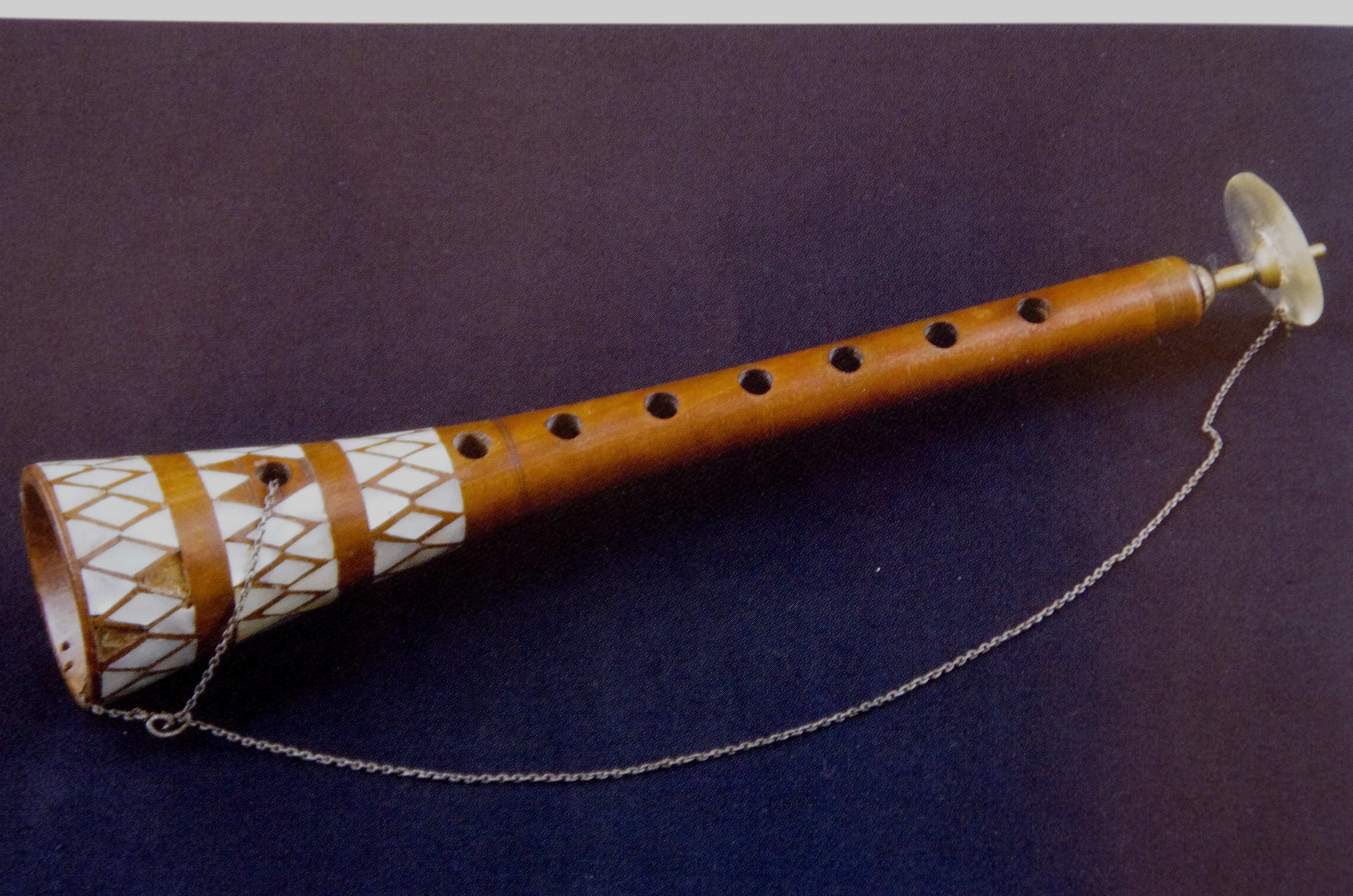 Azərbaycan milli musiqi aləti zurna